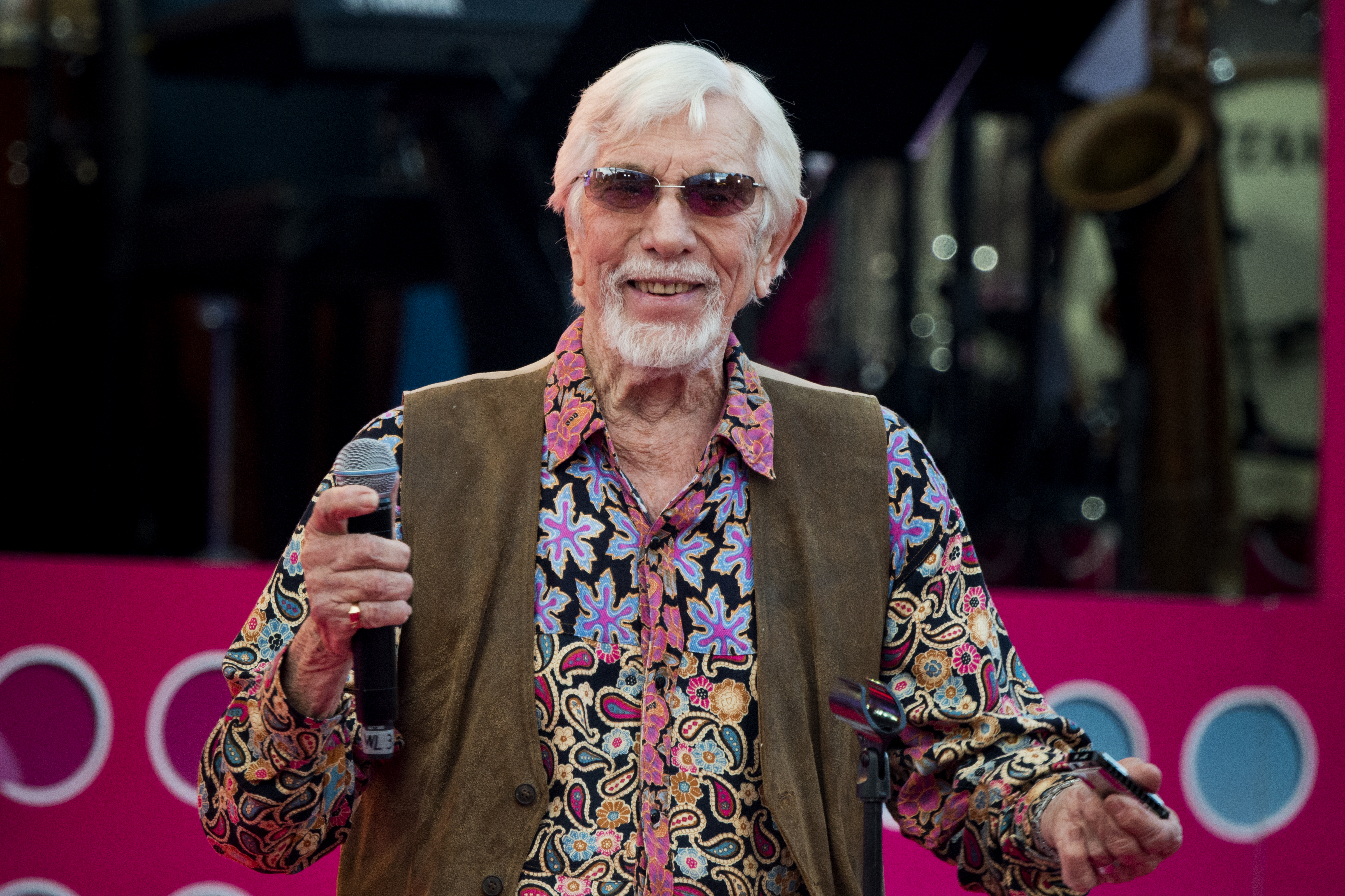 Owe Thörnqvist På Sommarkrysset, Gröna Lund, Stockholm